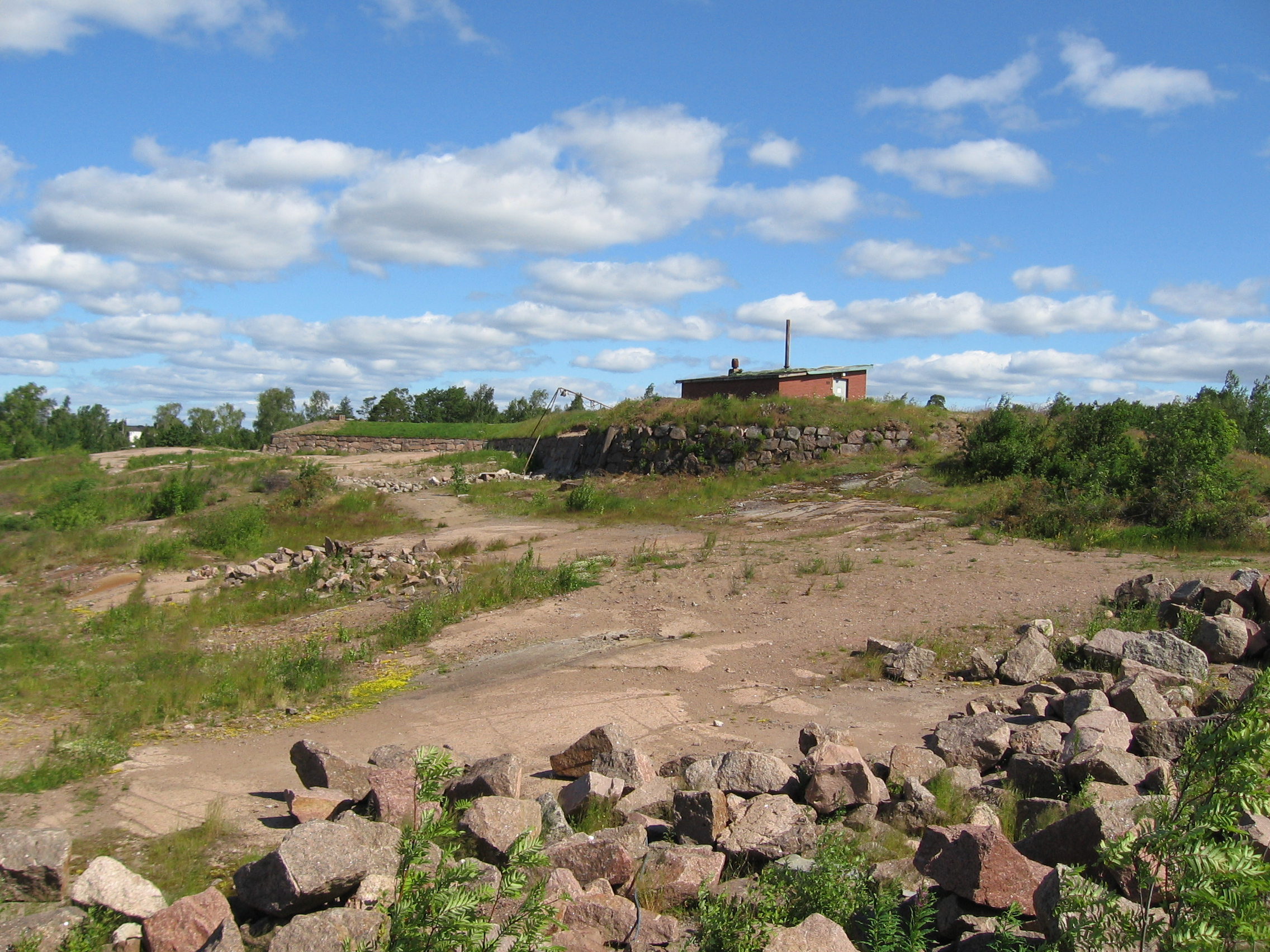 Fort Katarinan linnoitusta Kotkassa.